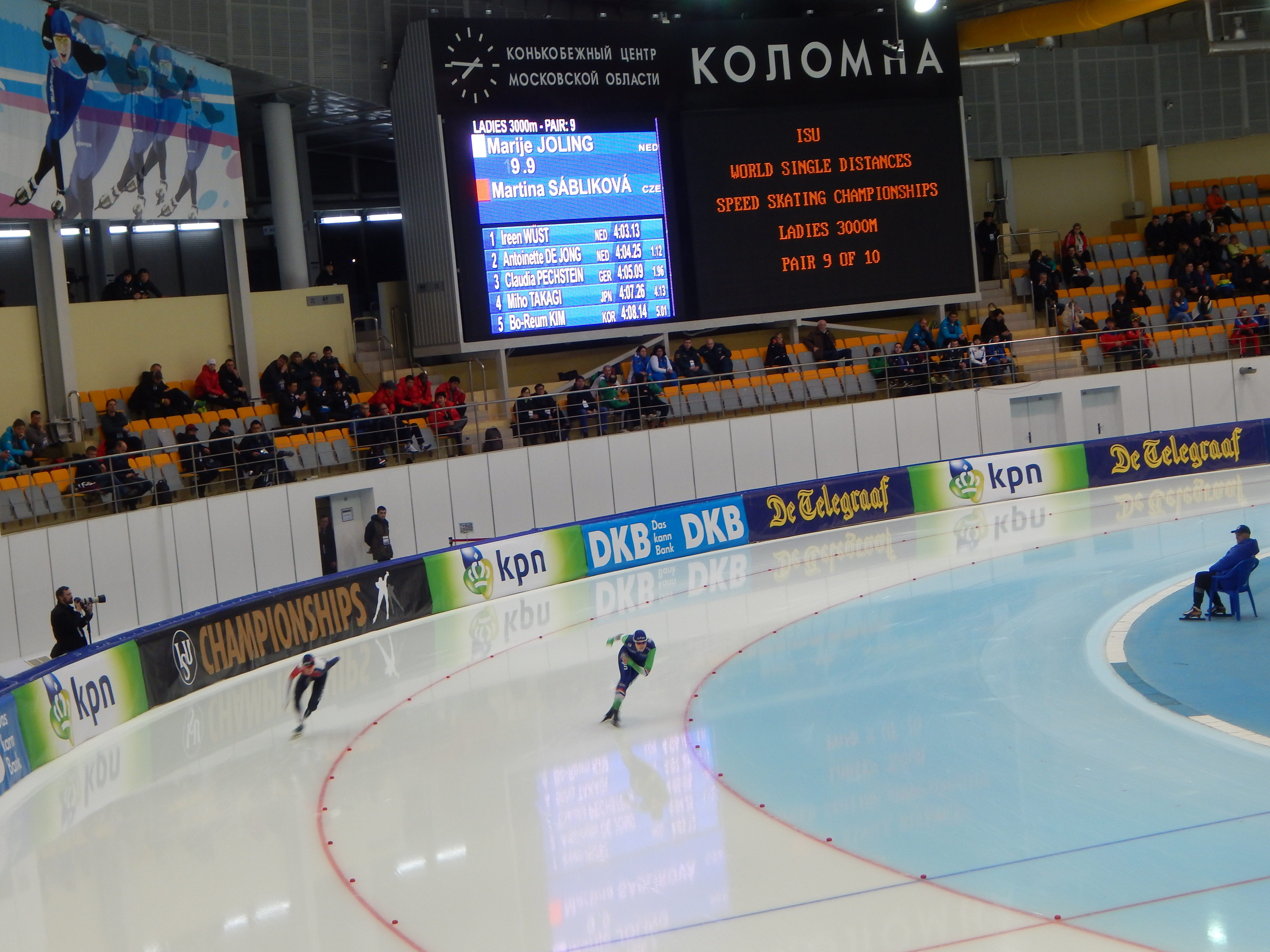 Чемпионат мира по конькобежному спорту 2016 в Коломне. Пара 9 в соревнованиях женщин в соревнованиях на 3000 метров